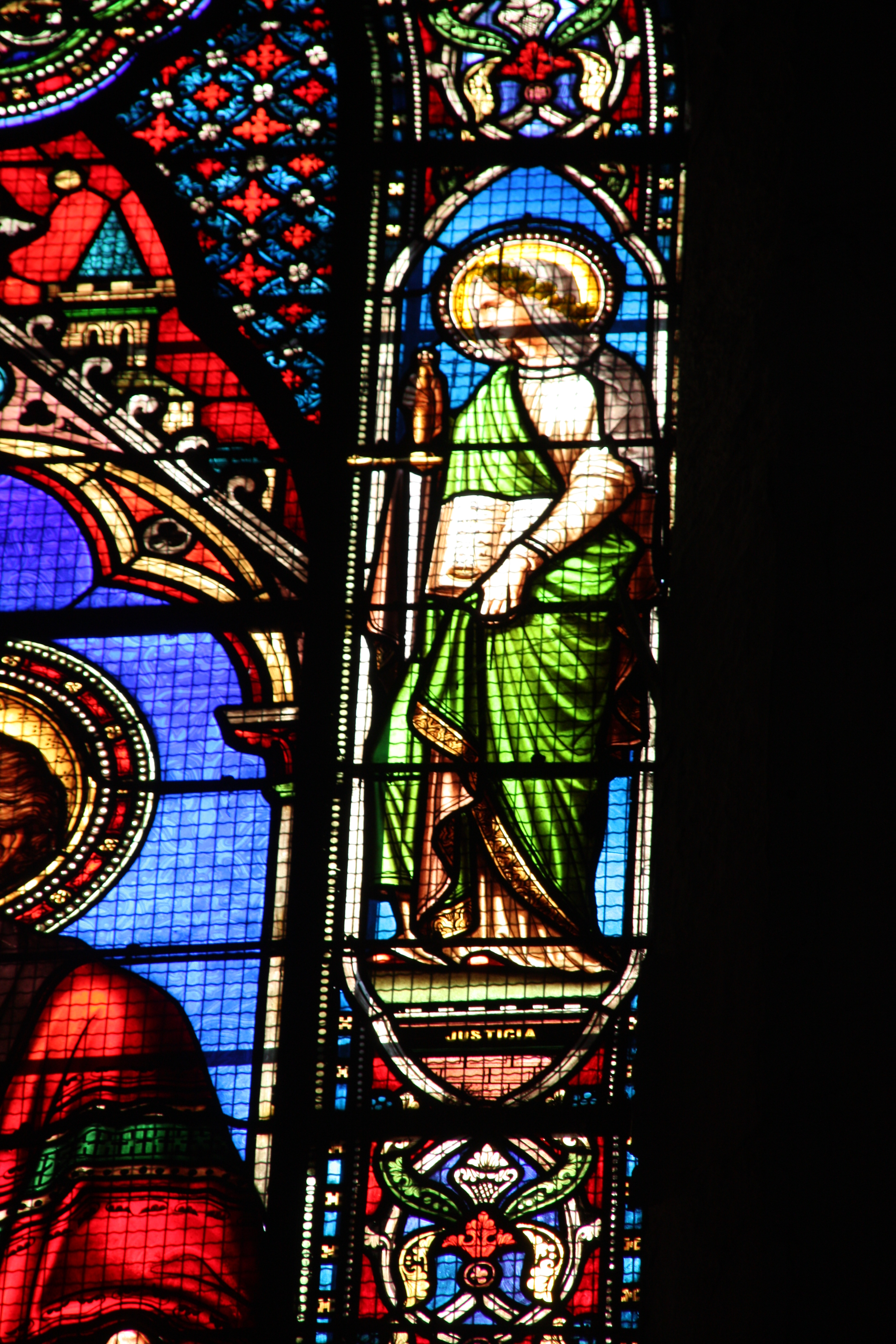 Vitrail de l'Église Saint-Paul à Montluçon France